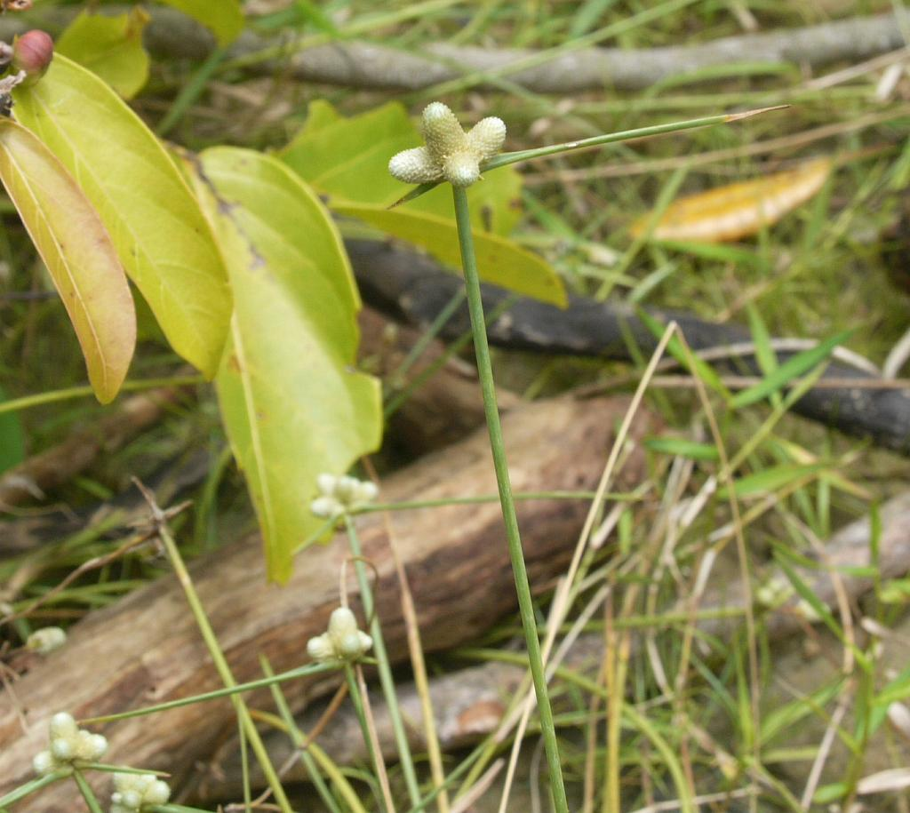 Lipocarpha chinensis：オオヒンジガヤツリ 2009/08/10 西表島：Iriomote Island, Okinawa Pref. Japan